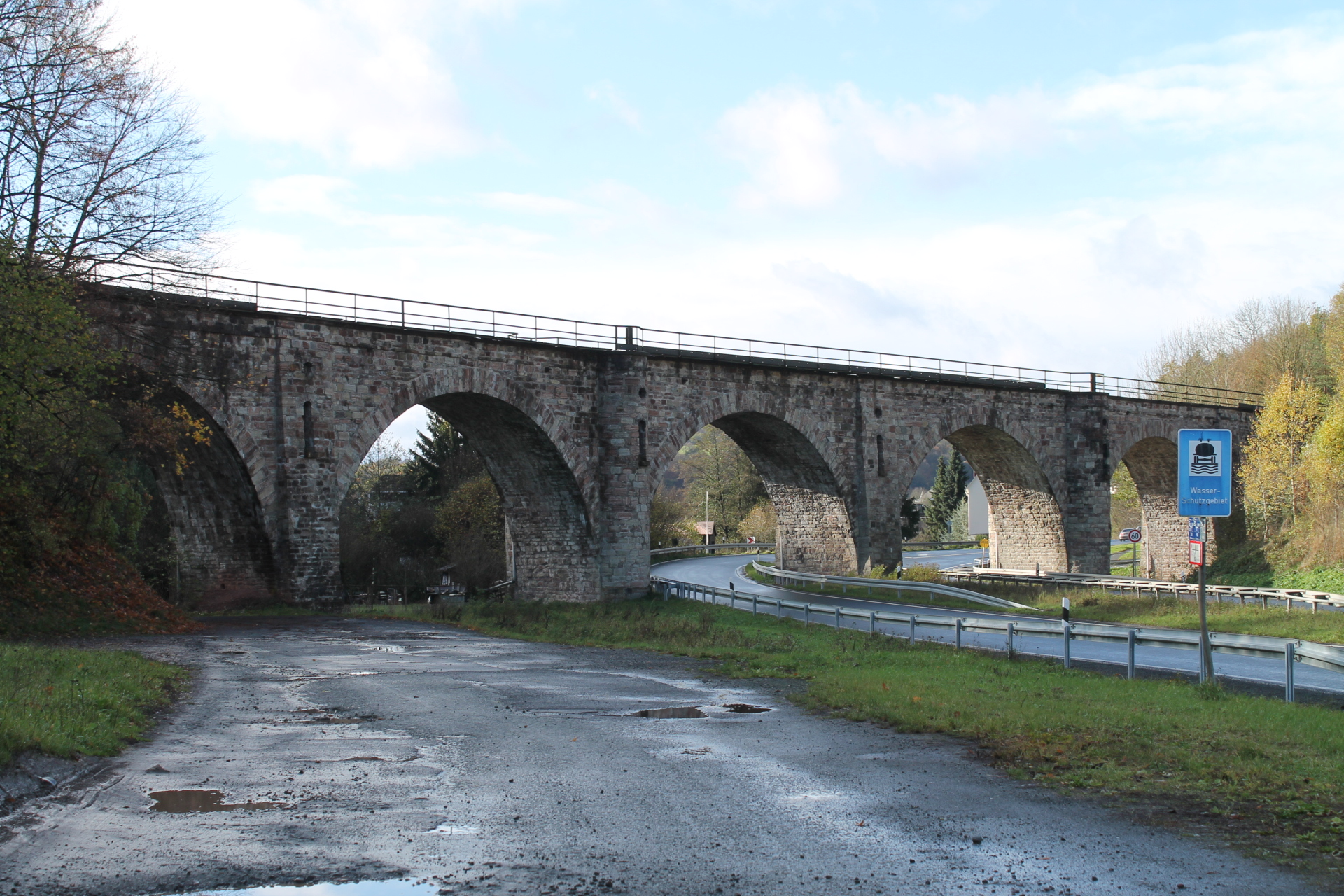 Viadukt Niederscheld der Scheldetalbahn